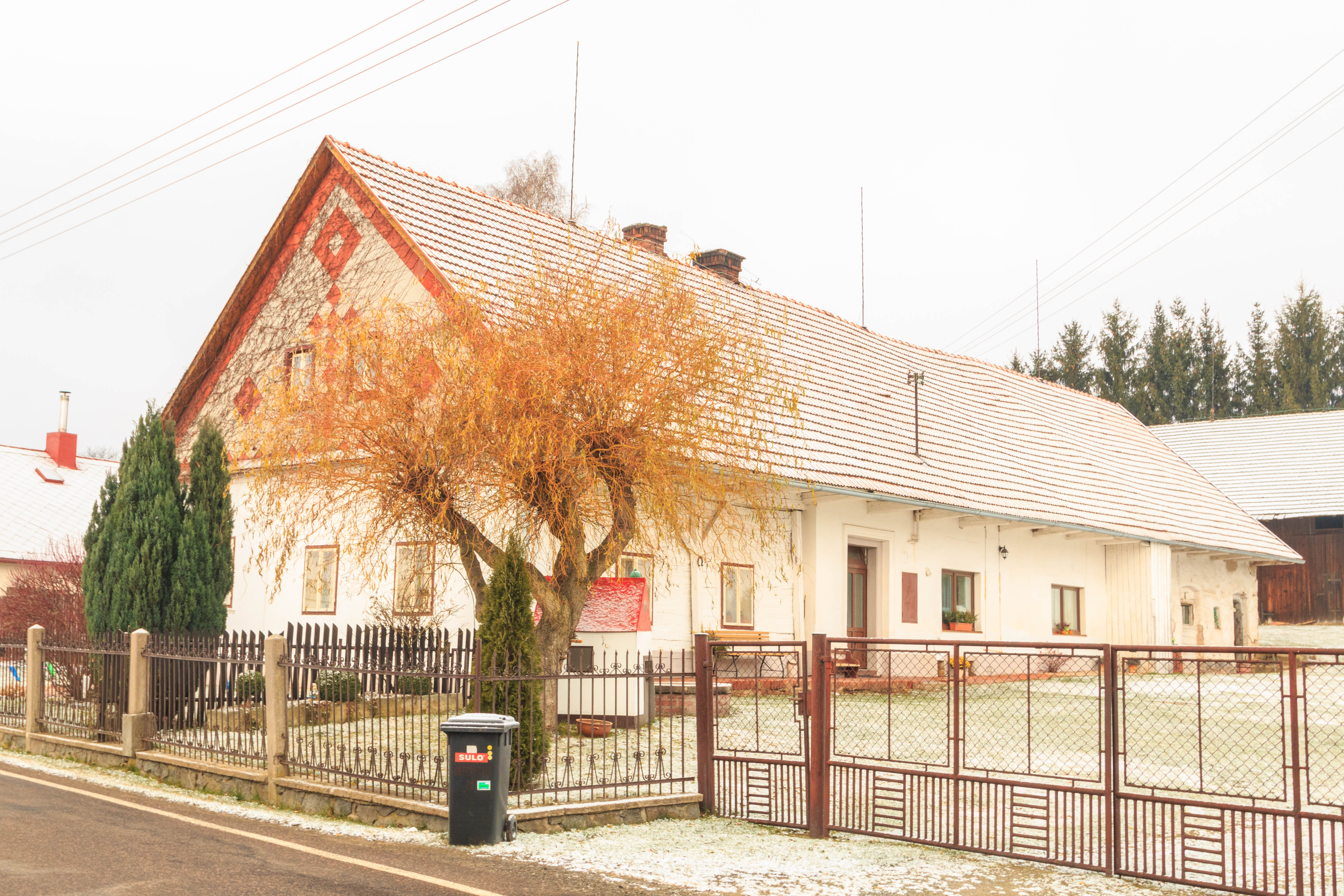 Slemeno - č. 1